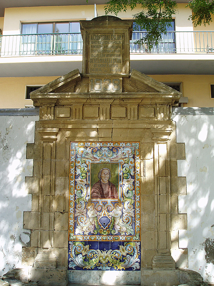 Monumento a Cristóbal Colón de 1938 en El Puerto de Santa María, España. El navegante genovés residió en este puerto andaluz entre 1484 y 1486 invitado por el señor de la villa, el Duque de Medinaceli.